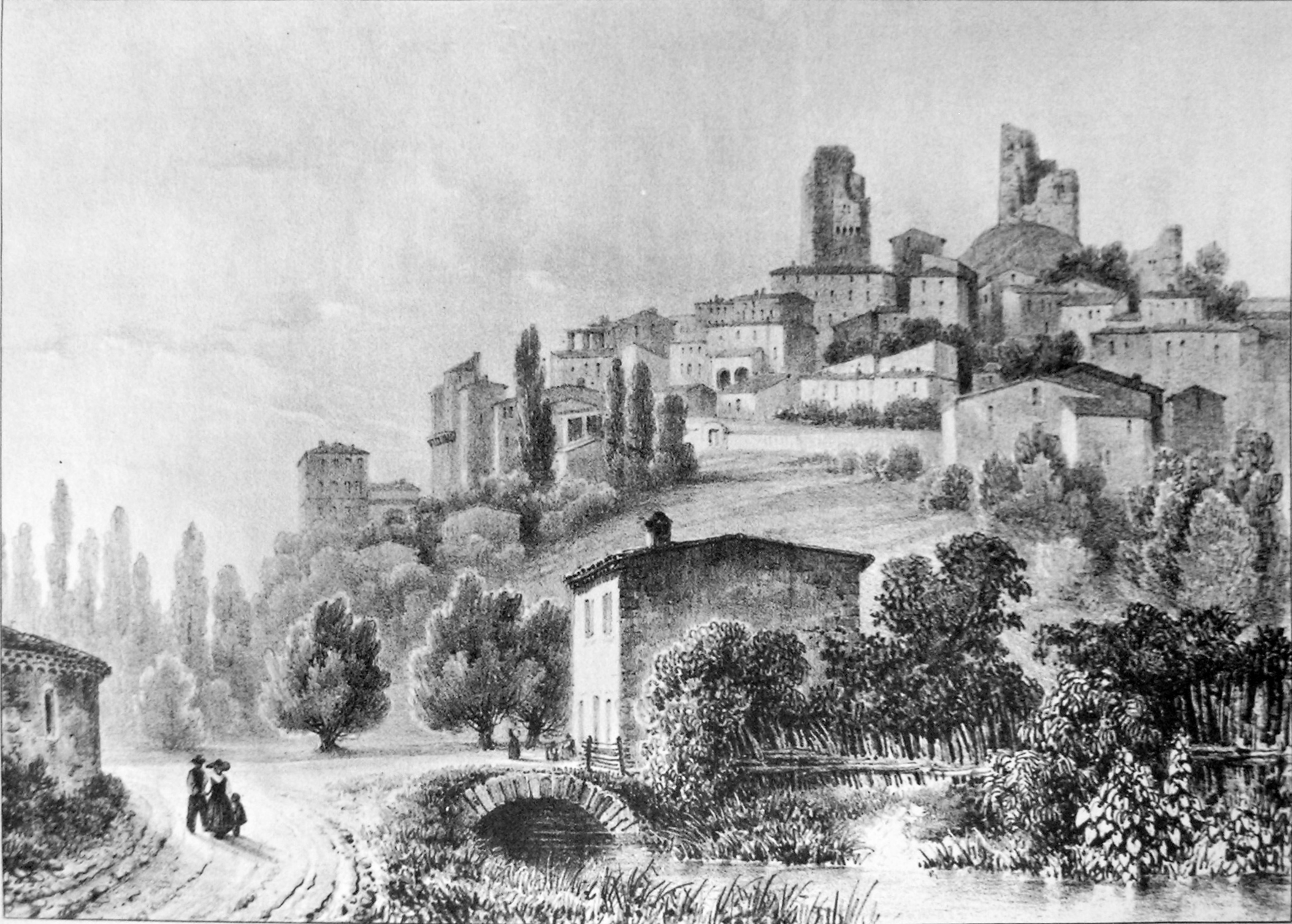 Allex (Drome) ATTENTION ! Ce facsimilé est réalisé en applicant des alterations avec un logiciel graphique à une copie numérique, obtenue à partir d'une prise de photo faite par un non-professionnel. Elle pourrait ne pas être parfaitement réussie.